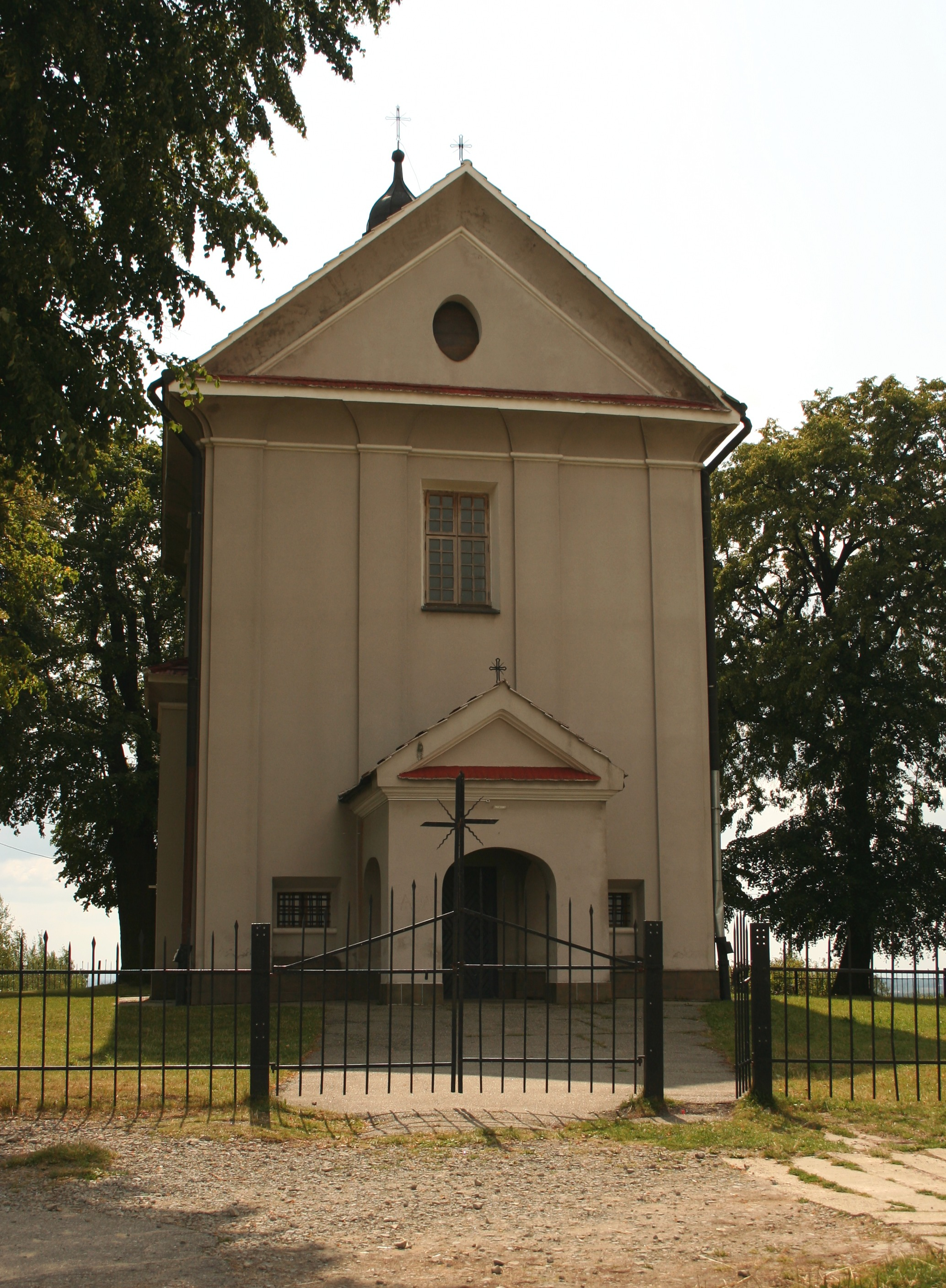 Malawa - Kosciół św. Magdaleny